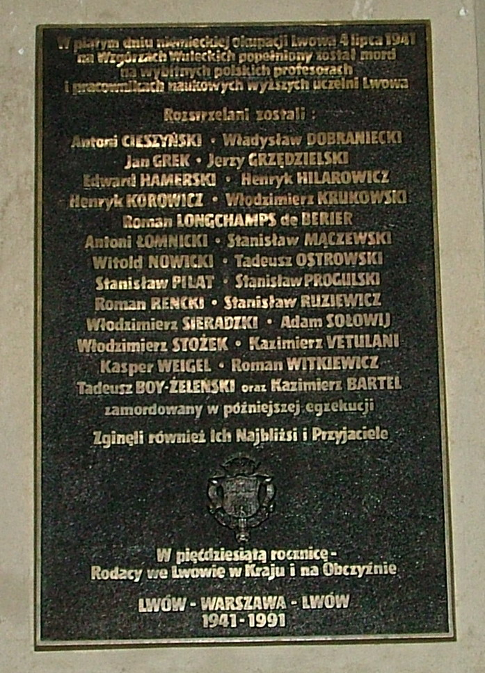 Stako, May 2005